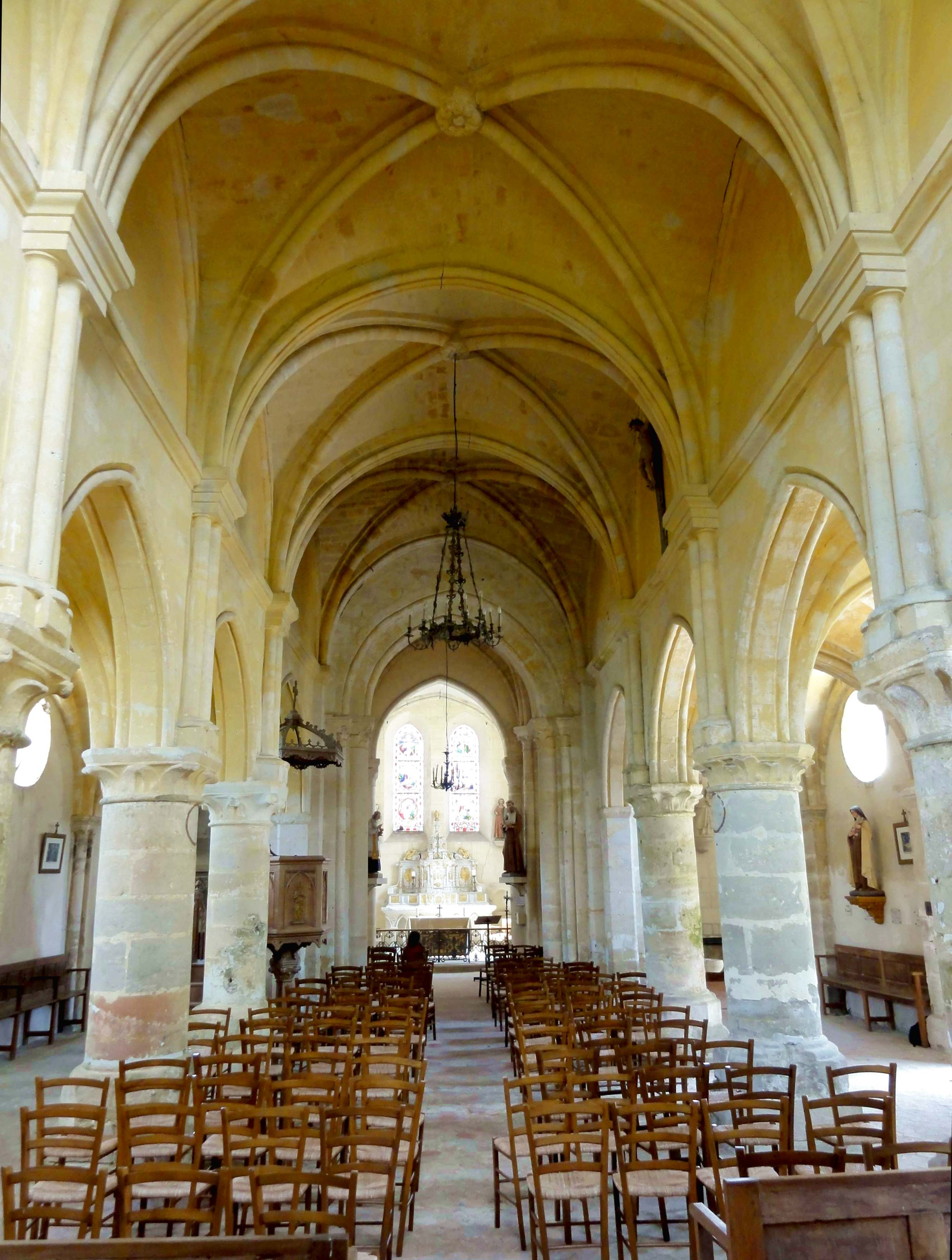 Intérieur de l'église (voir titre).